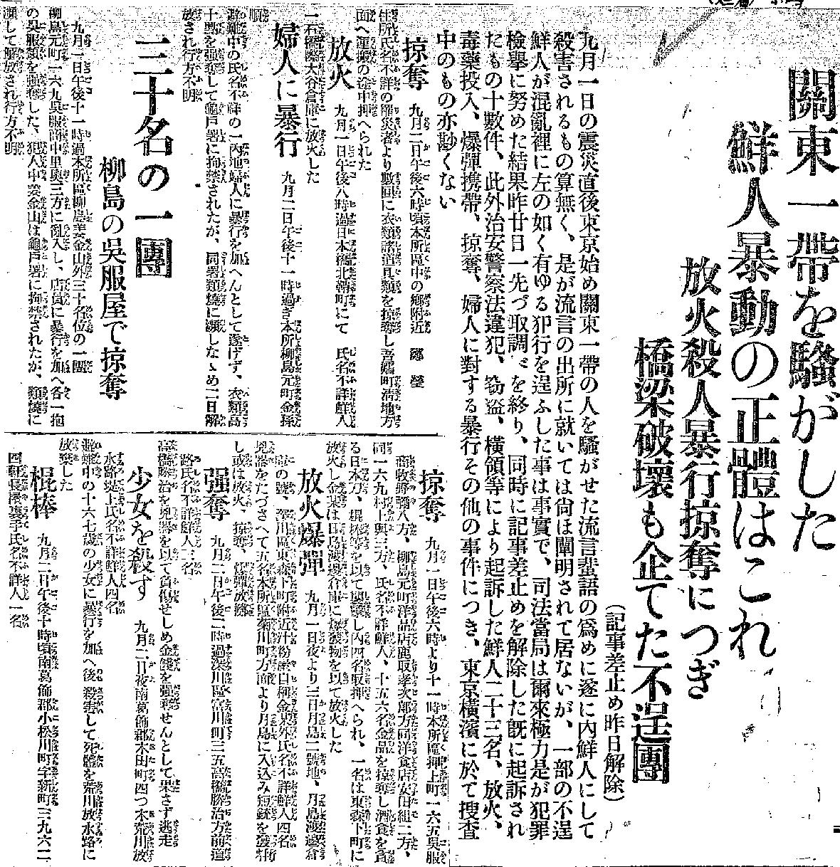 「関東一帯を騒がした鮮人暴動の正体はこれ : 放火殺人暴行掠奪につぎ橋梁破壊も企てた不逞団」前段。